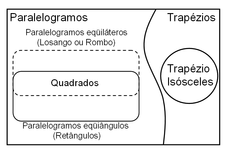 Paralelogramos